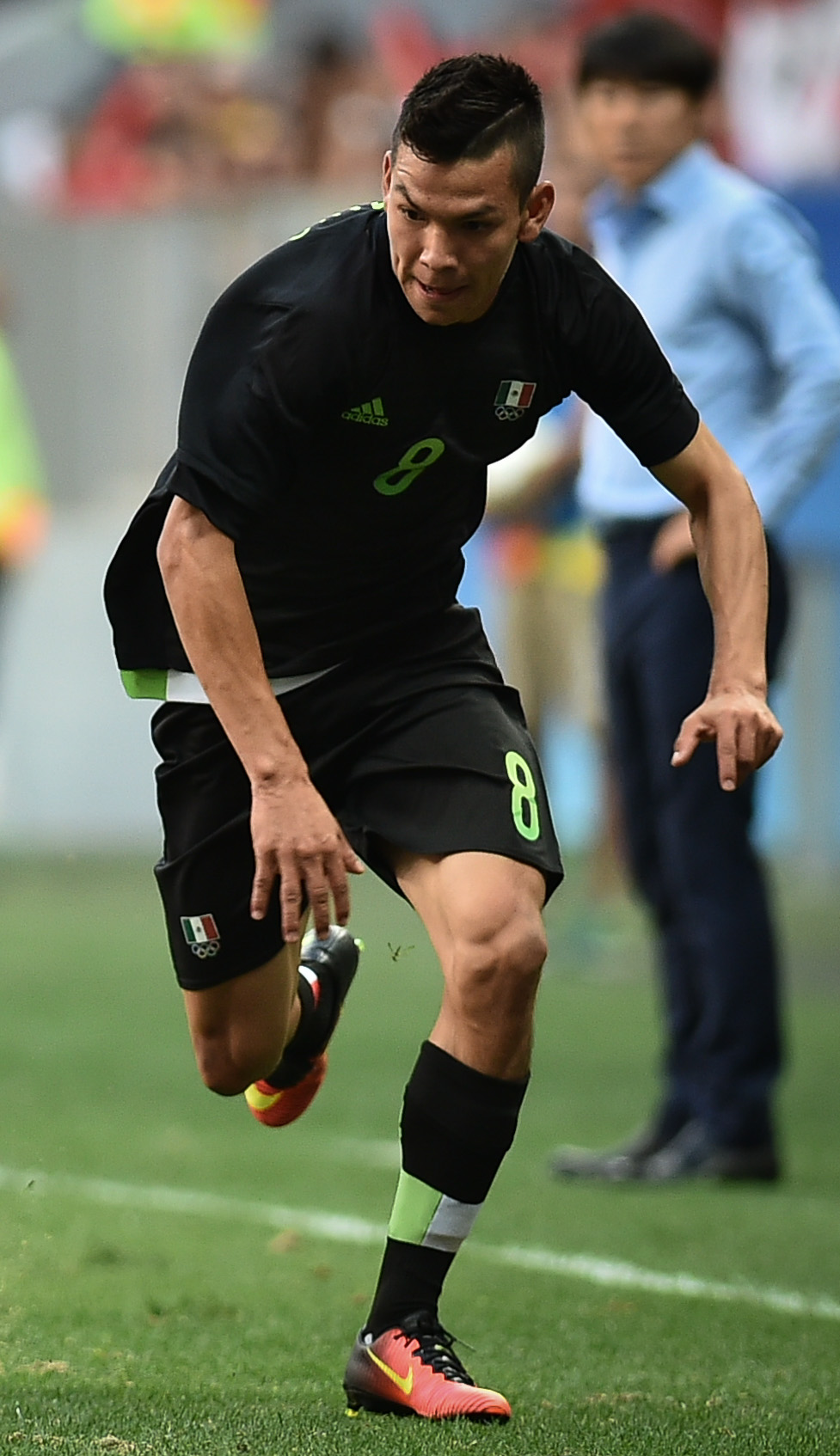 Estádio Nacional de Brasília Mané Garrincha, Brasília, DF, Brasil, 10/8/2016 Foto: Andre Borges/Agência Brasília. O time da Coréia do Sul classificou-se para a próxima fase do torneio de futebol masculino da Olimpíada com uma vitória por 1 a 0 contra o México. Kwon Chang-hoon marcou o gol da vitória sul-coreana aos 32 minutos do segundo tempo.